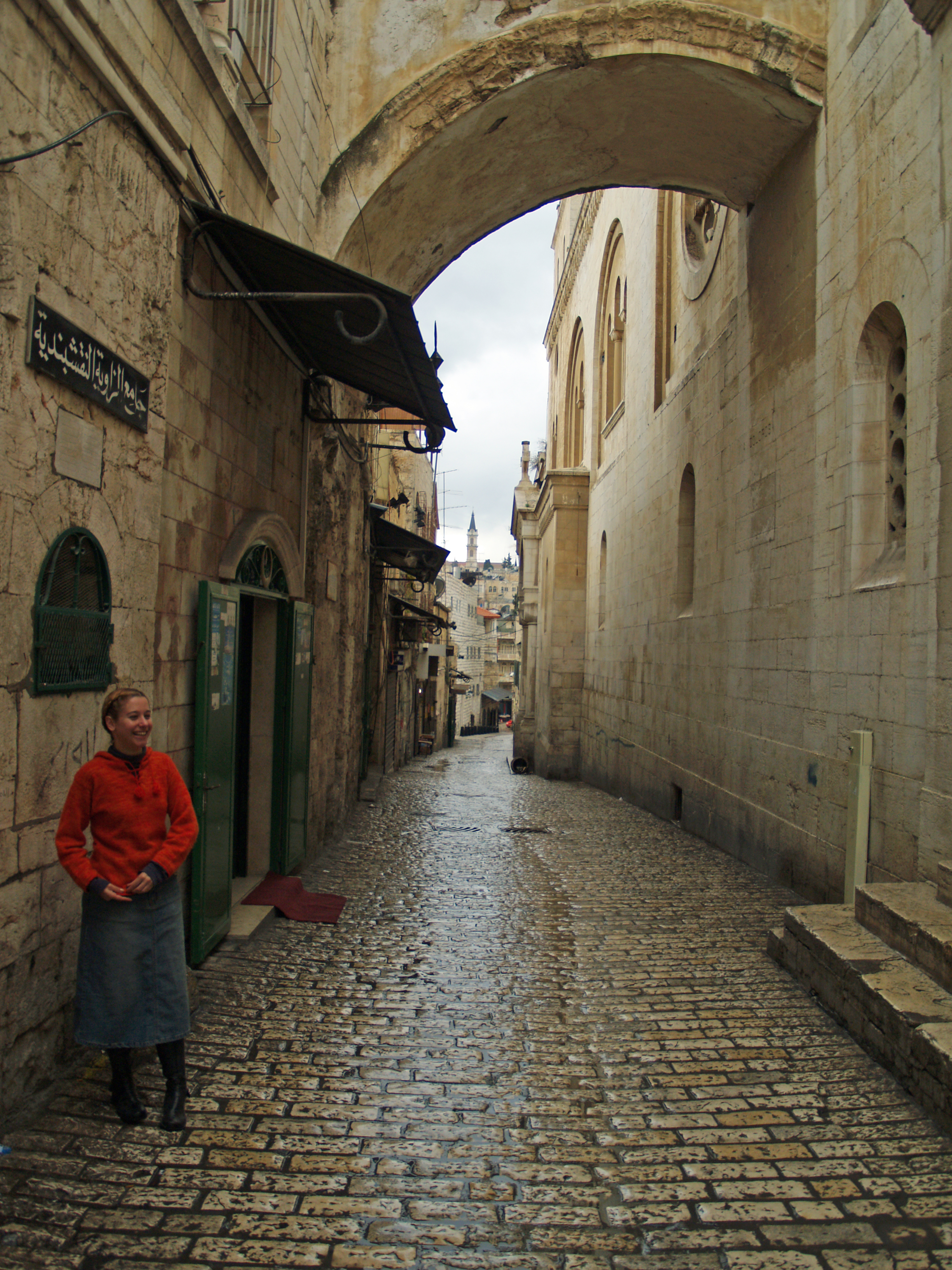 Via Dolorosa